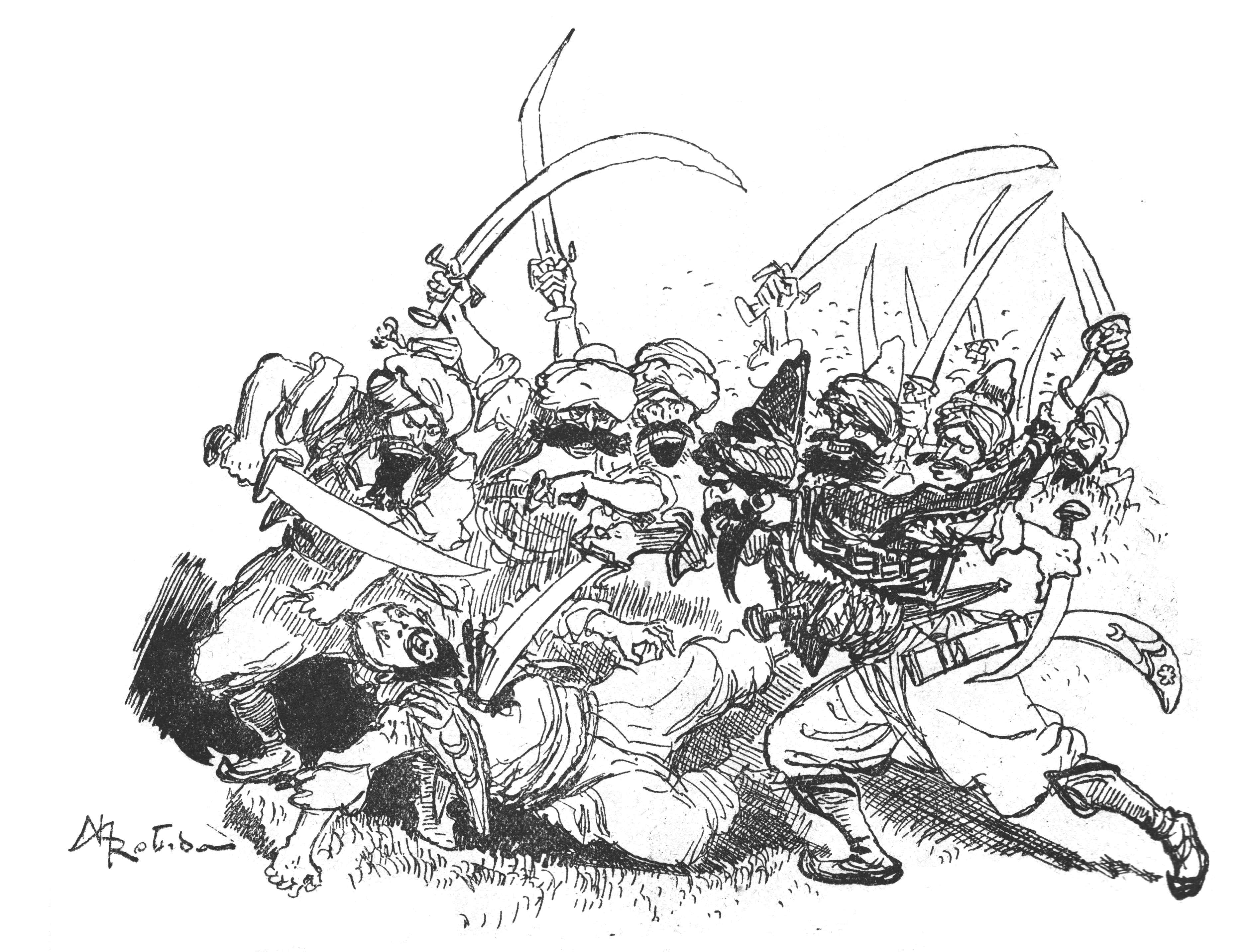 Illustration d'Albert Robida d'Ali-Baba et les quarante voleurs page 6